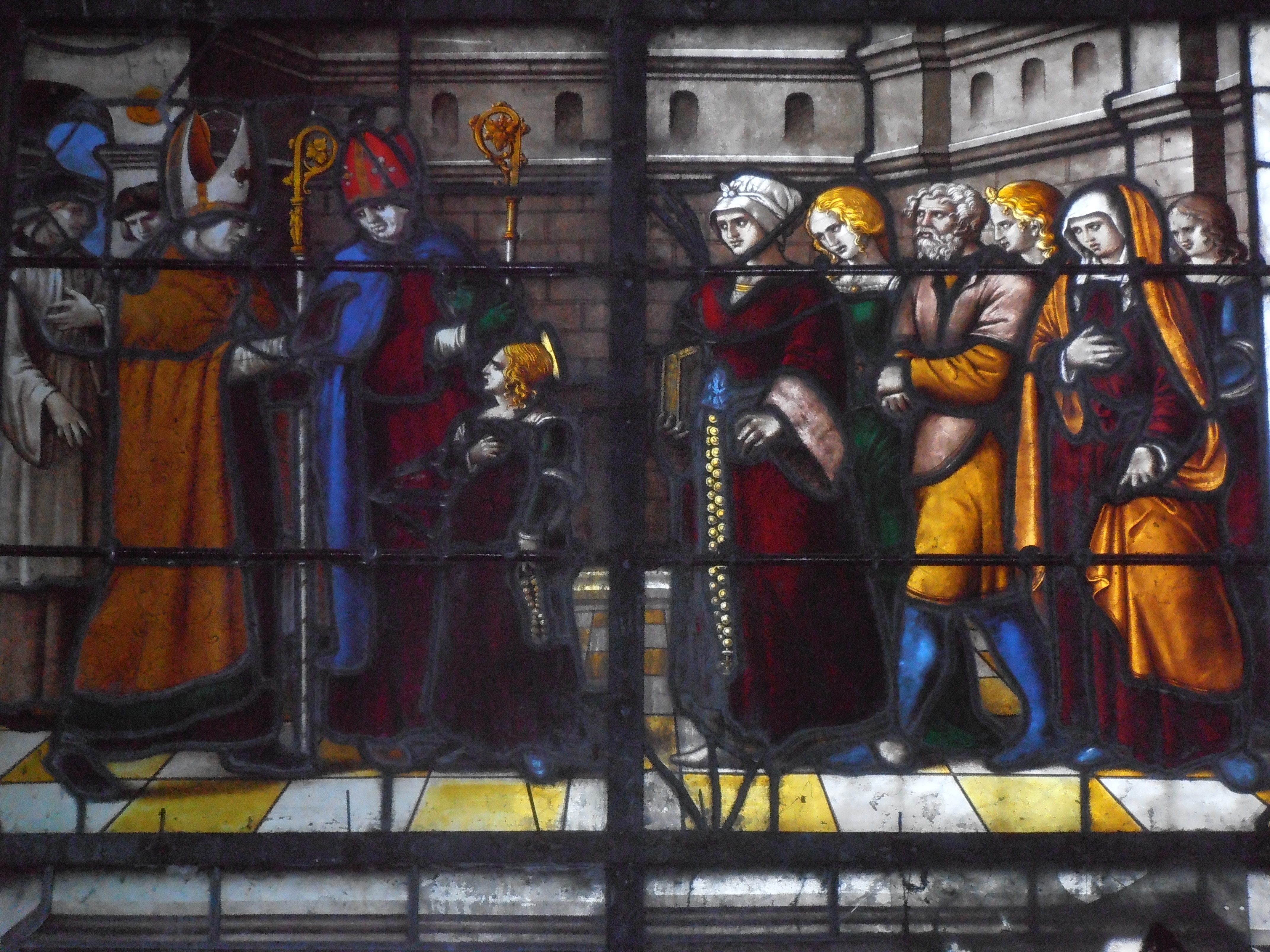 Vitrail illustrant la vie de sainte Geneviève à genoux devant saint Germain d'Auxerre et saint Loup de Troyes; vitrail du XVIe siècle de l'église de Saint-Julien-du-Sault (Yonne) France.